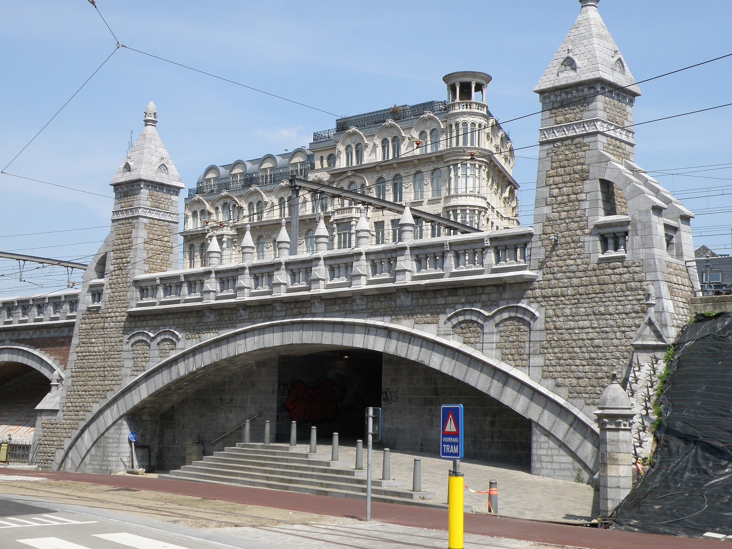 Antwerpen, Oostenstraat nr. 50. Flatgebouw in eclectische stijl (1920-1925) n.o.v. archit. Frans Van Rompaey, gelegen in wijk Zurenborg, op hoek Oostenstraat/Steenbokstraat. Op voorgrond: spoorbrug tussen Arendstr. en Zurenborgstr. Foto genomen vanaf Mercatorstraat. Vgl. verder Vlaams Inventaris van het Onroerend Erfgoed.